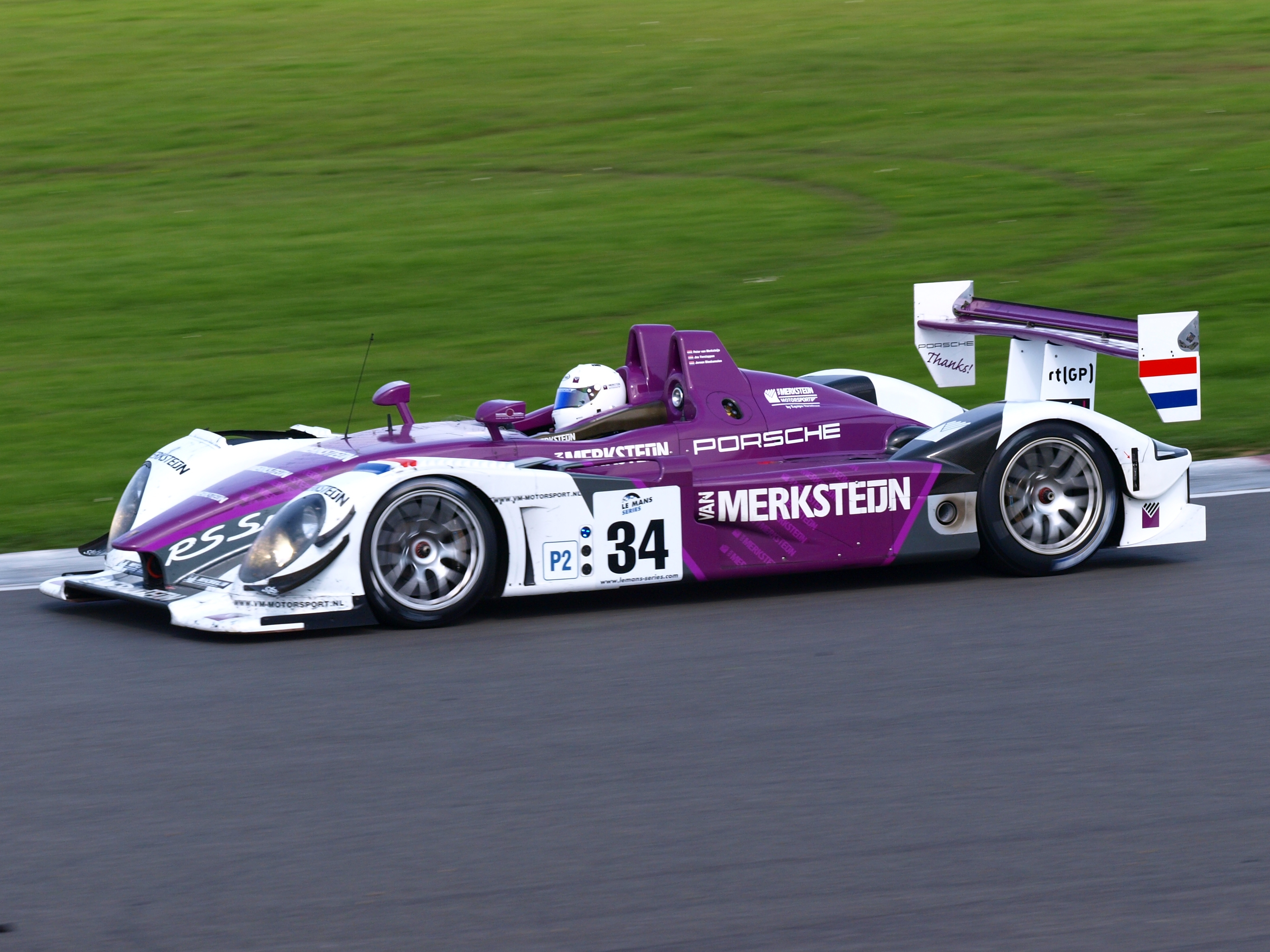 Van Merksteijn Motorsport's Porsche RS Spyder at the 2008 1000km of Silverstone.